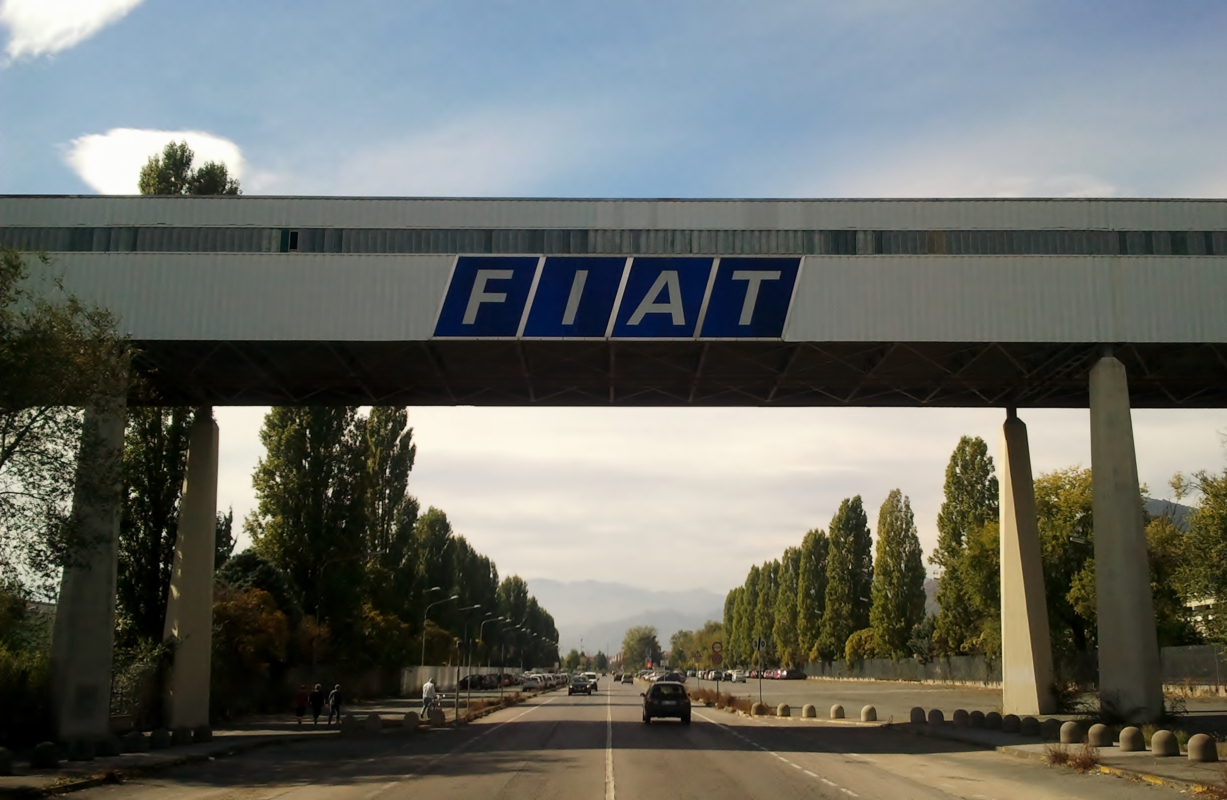 Fiat Rivalta. Torino. Italy